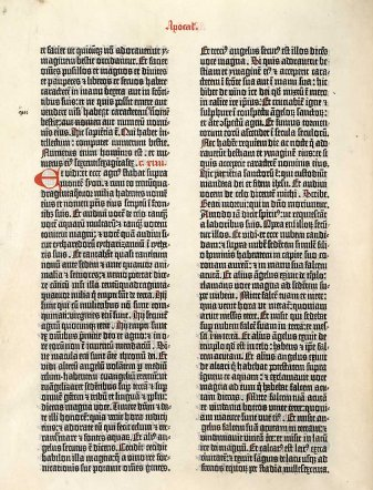 "Gutenberg bible" page